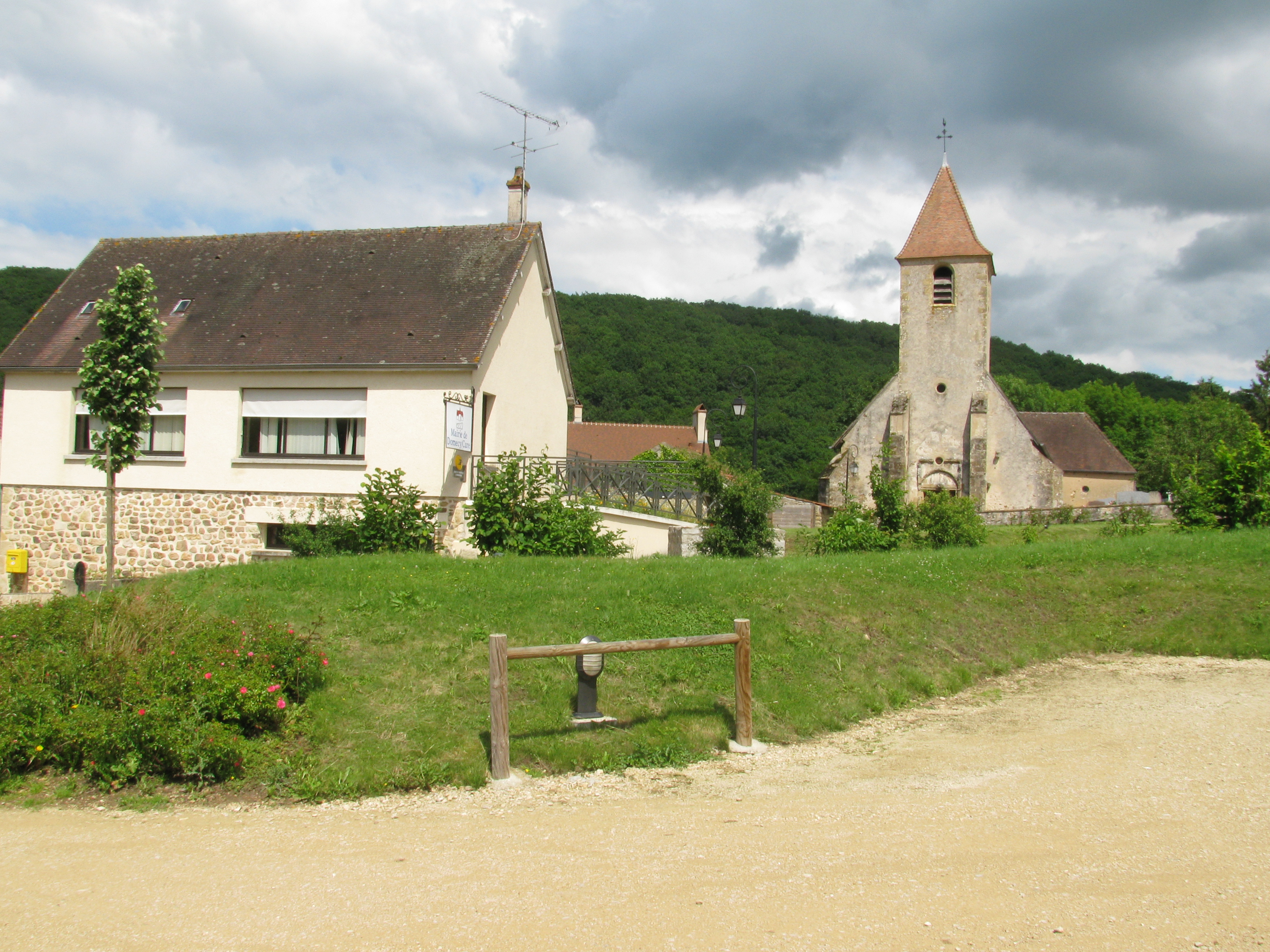 La mairie et l'église Saint-Antoine de Domecy-sur-Cure, Yonne, France.